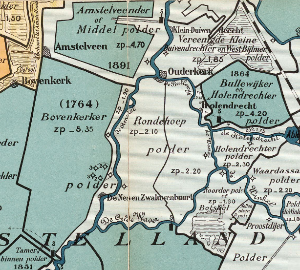 Rondehoeppolder en omgeving